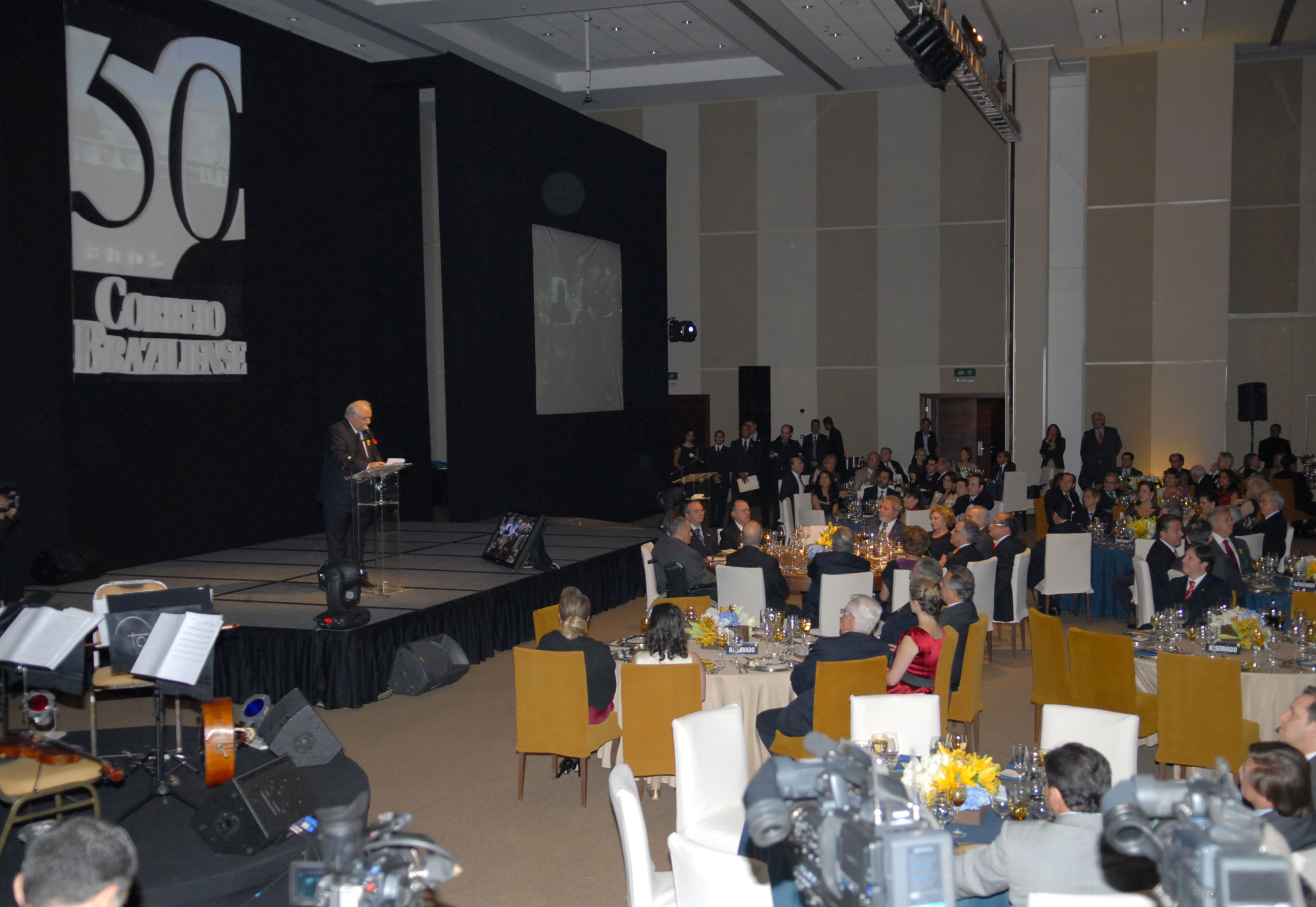 O presidente dos Diários Associados, Álvaro Teixeira, fala durante jantar comemorativo dos 50 anos do jornal Correio Braziliense.